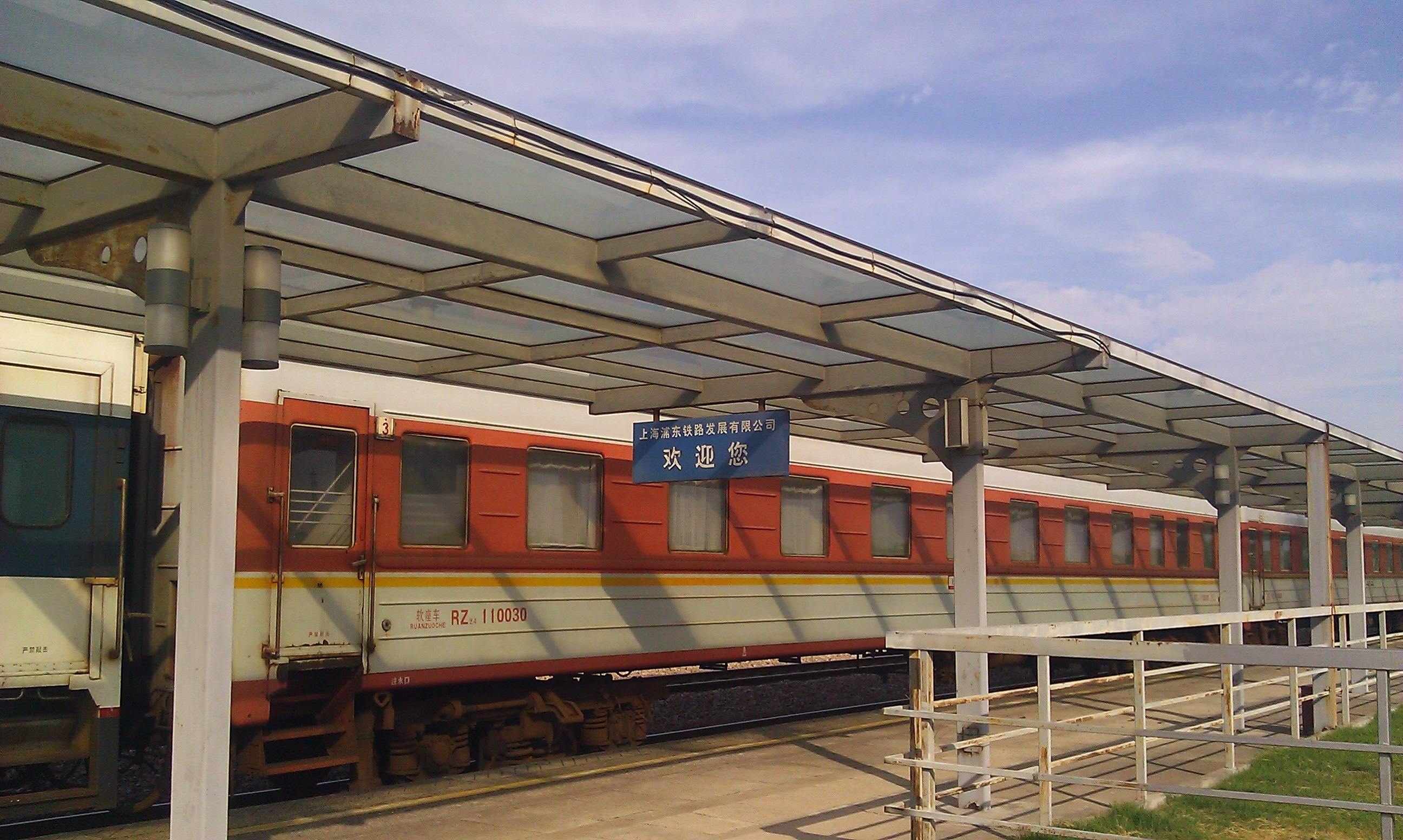 停靠在芦潮港（临港）火车站的RZ24